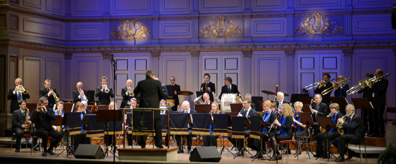 Nyårskonsert med Stockholms Musikkår Tre Kronor på Nybrokajen 11 den 6 januari 2013.